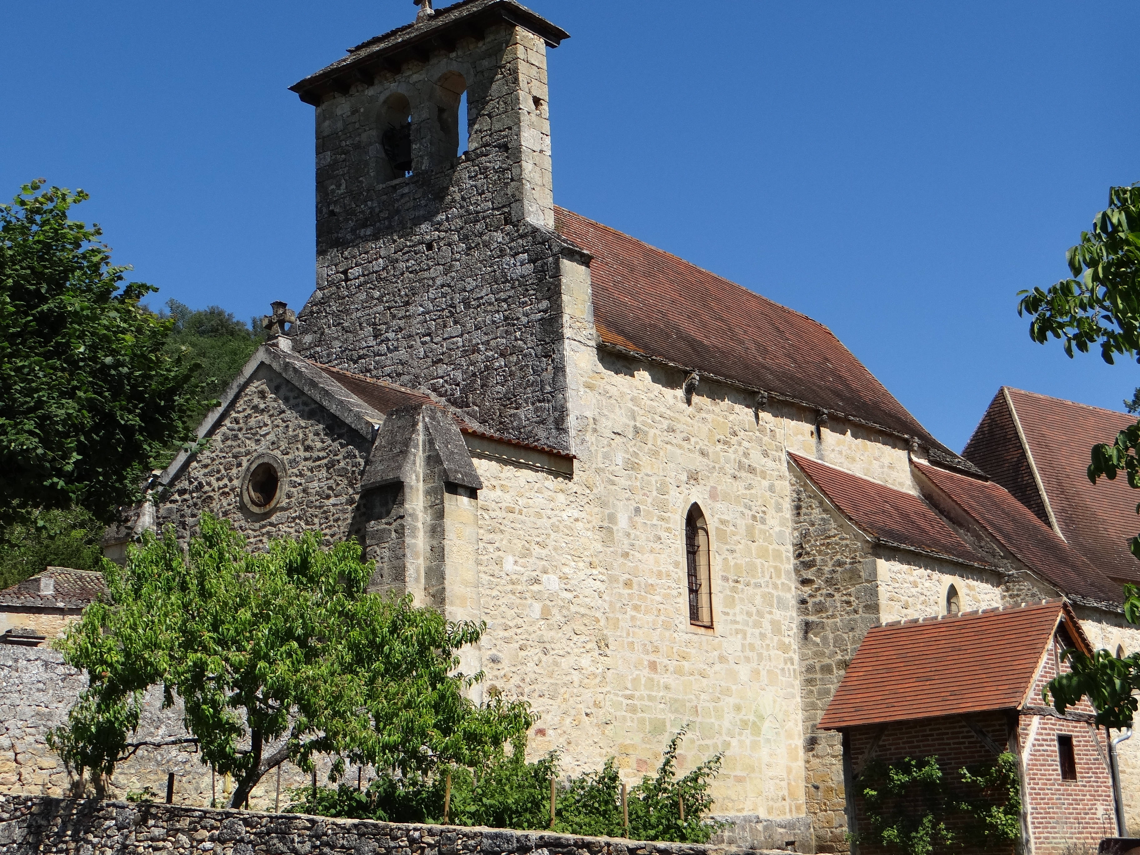 Bézenac - Eglise